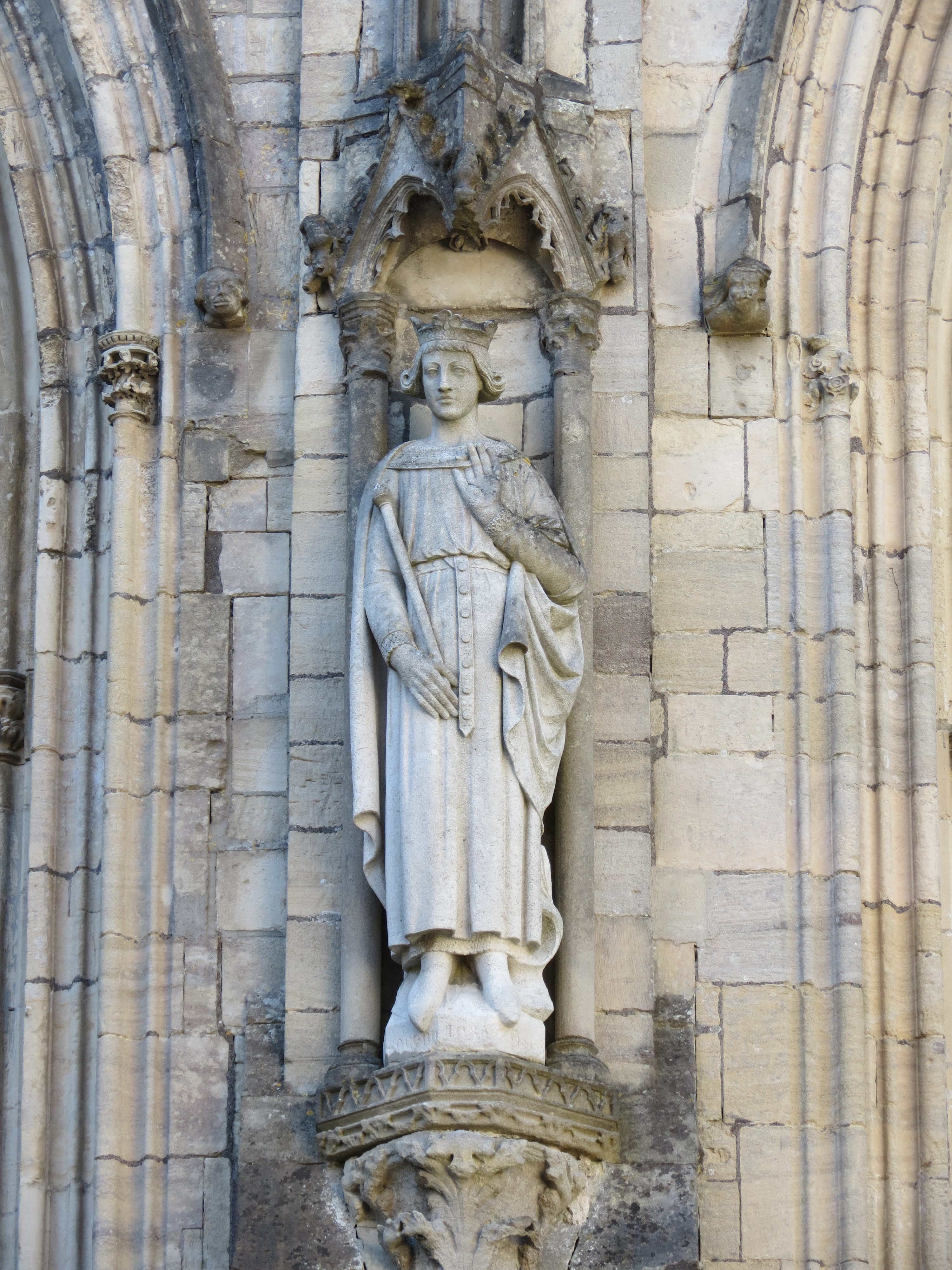 Statue de Robert Guiscard datant de 1875, remplaçant celle abîmée à la Révolution.